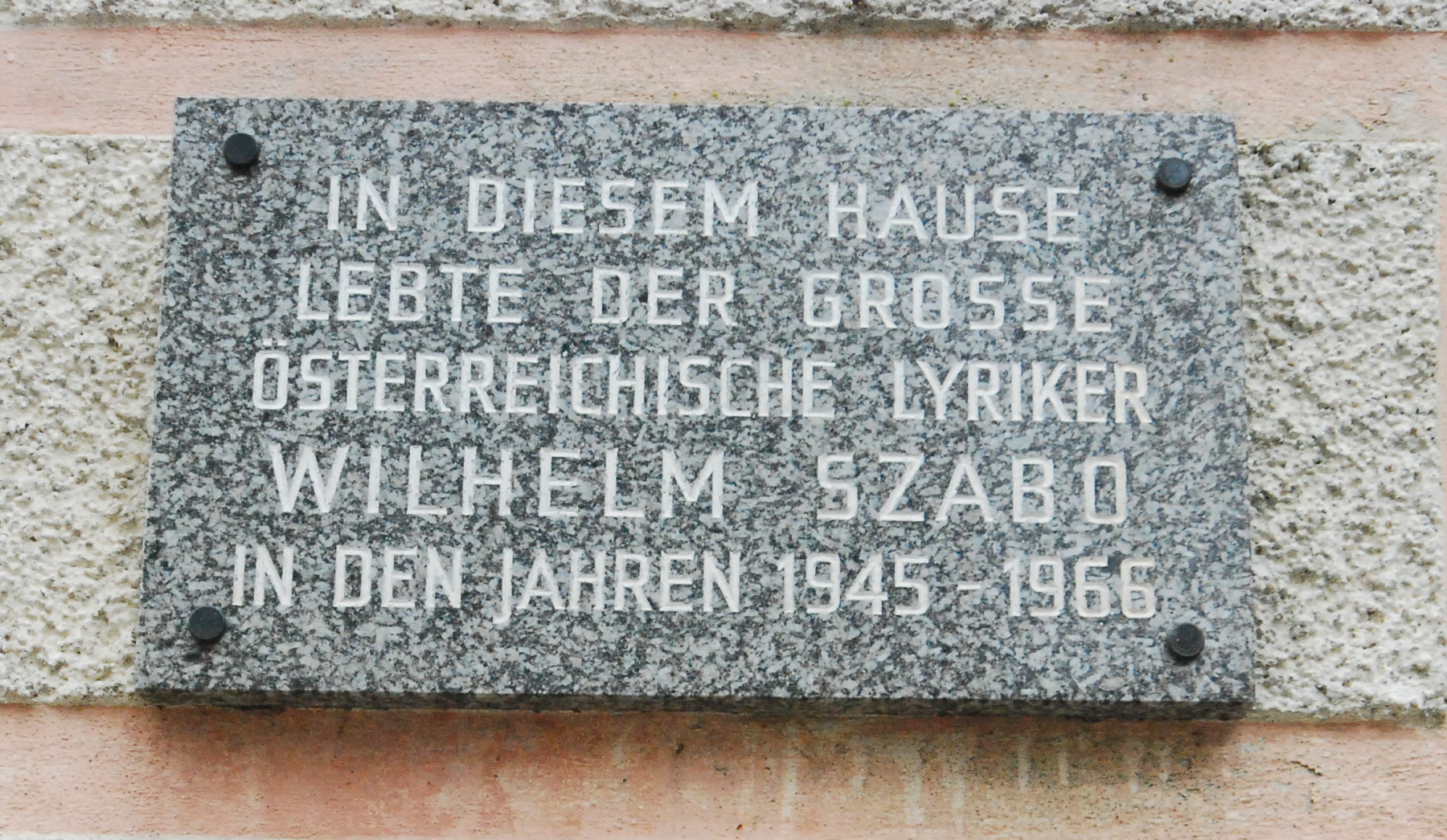 Gedenktafel am Castellihaus in Weitra in Niederösterreich